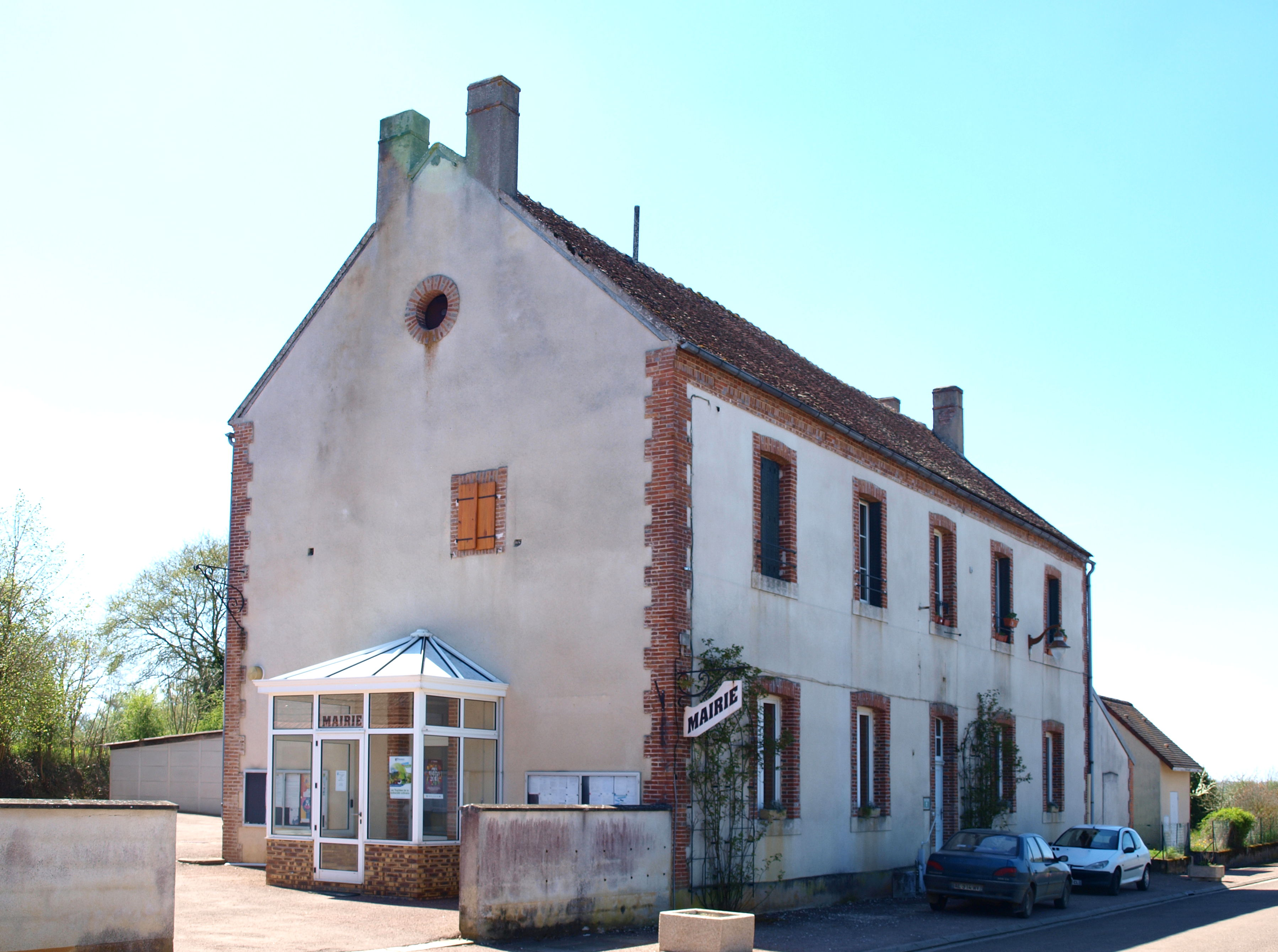 Bitry (Nièvre, France) , la mairie.